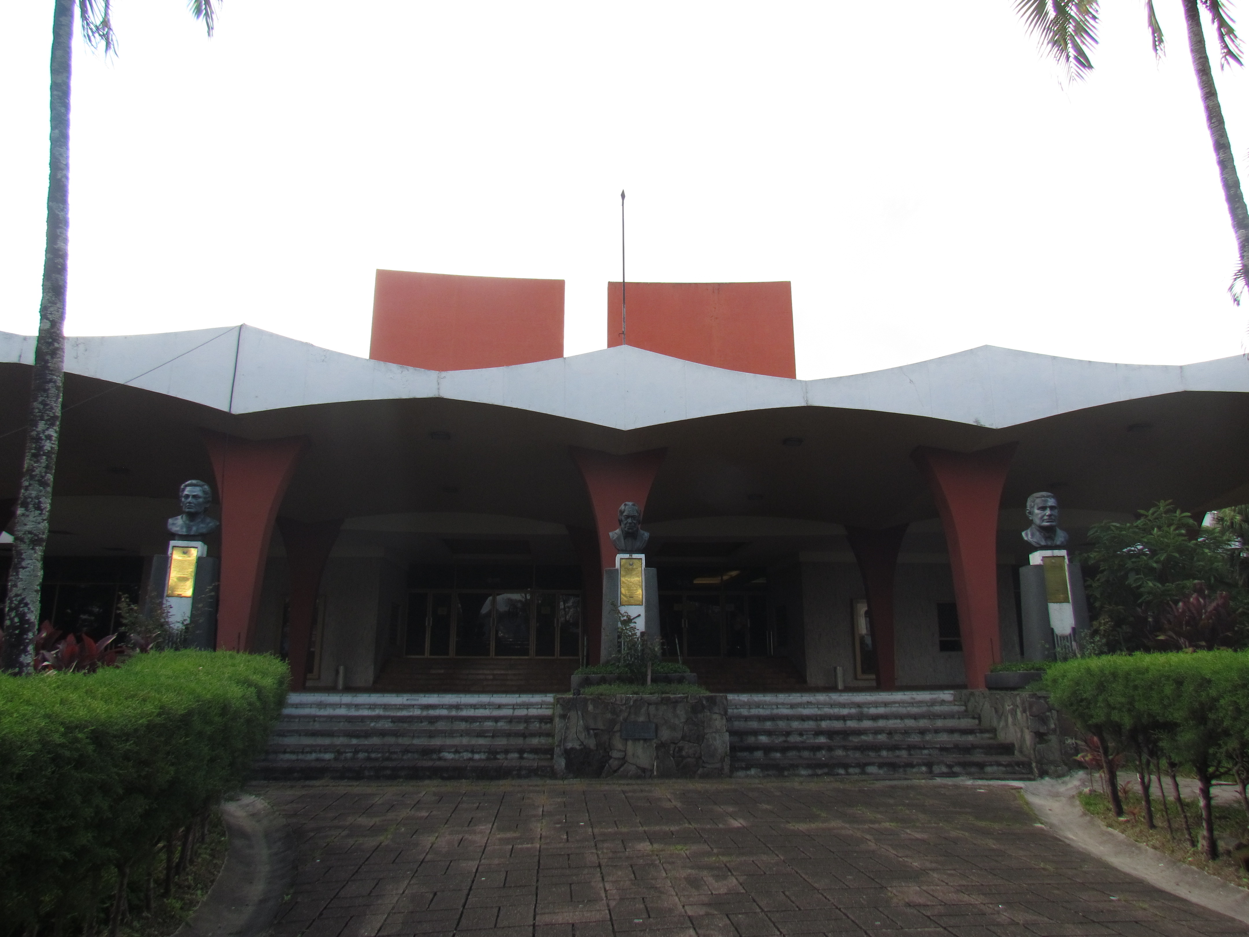 Teatro Presidente. Ubicado frente al Museo de Arte de El Salvador MARTE, en la ciudad de San Salvador.